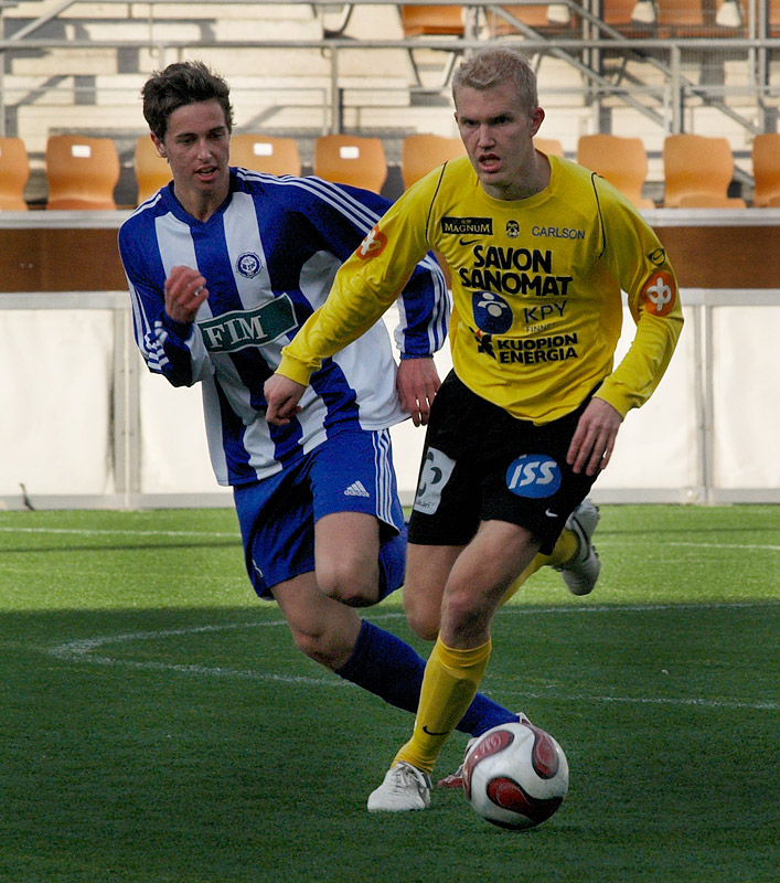 Striker Ilja Venäläinen (#10, in yellow) of KuPS being trailed by defender Sakari Mattila (#3, in blue) of Klubi-04. Finnish Ykkönen (1st div.) League Game Klubi-04 vs. KuPS in Finnair Stadium, Helsinki. Final Result 0-1 (0-1).